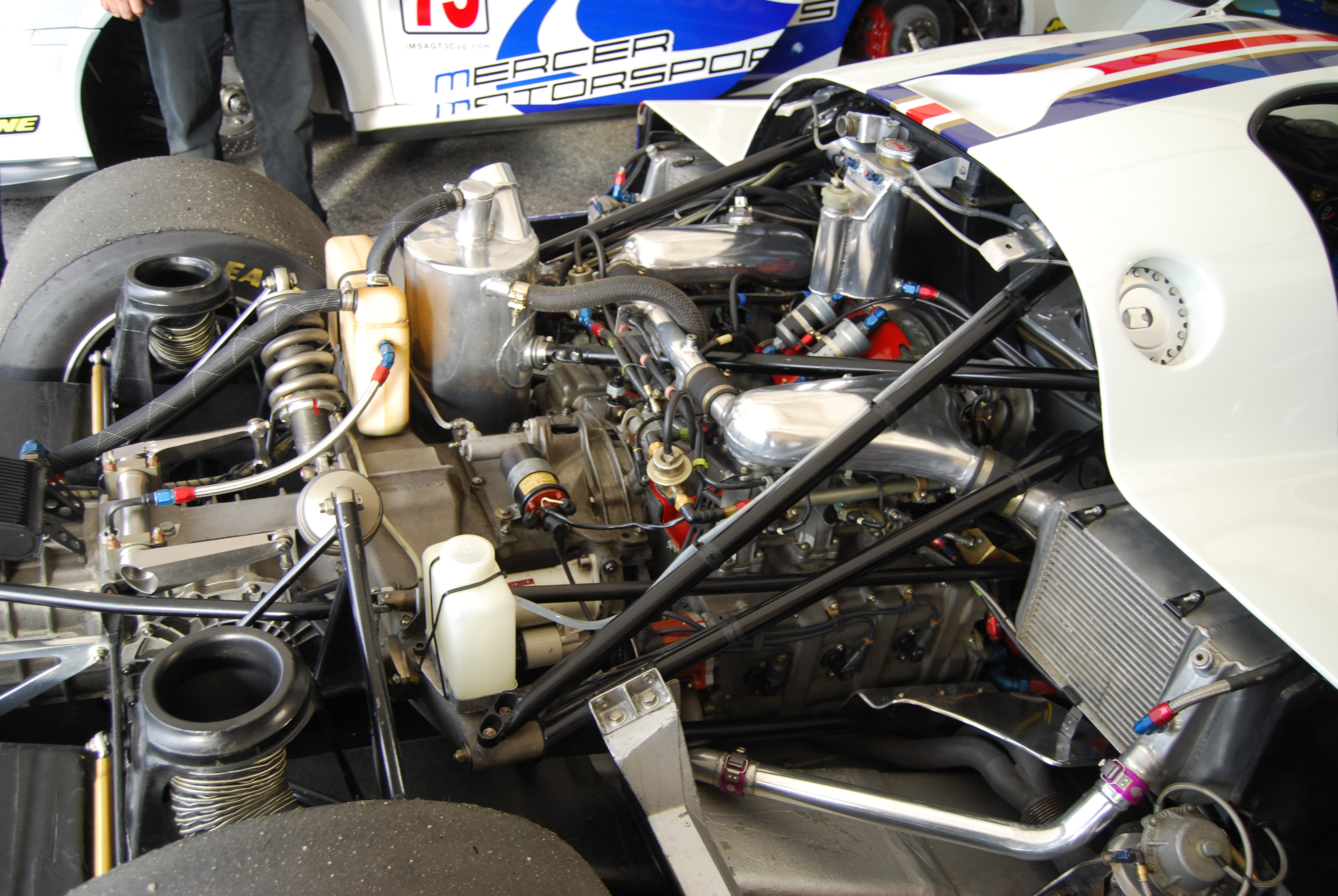 6e10_DSC_0510